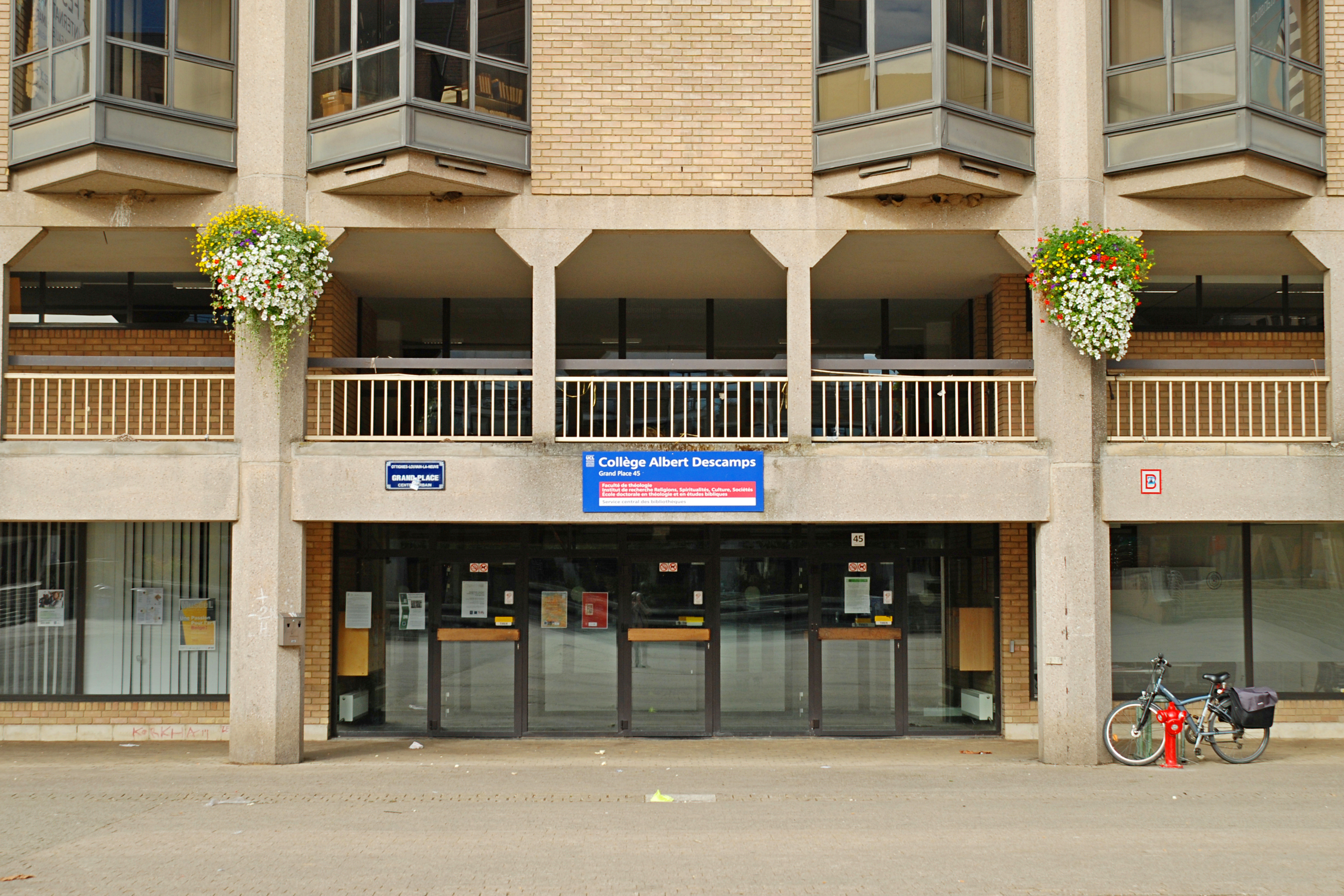 Belgique - Louvain-la-Neuve - Grand-Place - Collège Albert Descamps (faculté de théologie) This photo of immovable heritage has been taken in the Walloon Region